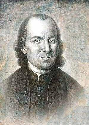 Kristián David (1692 - 1751), Moravský misionář